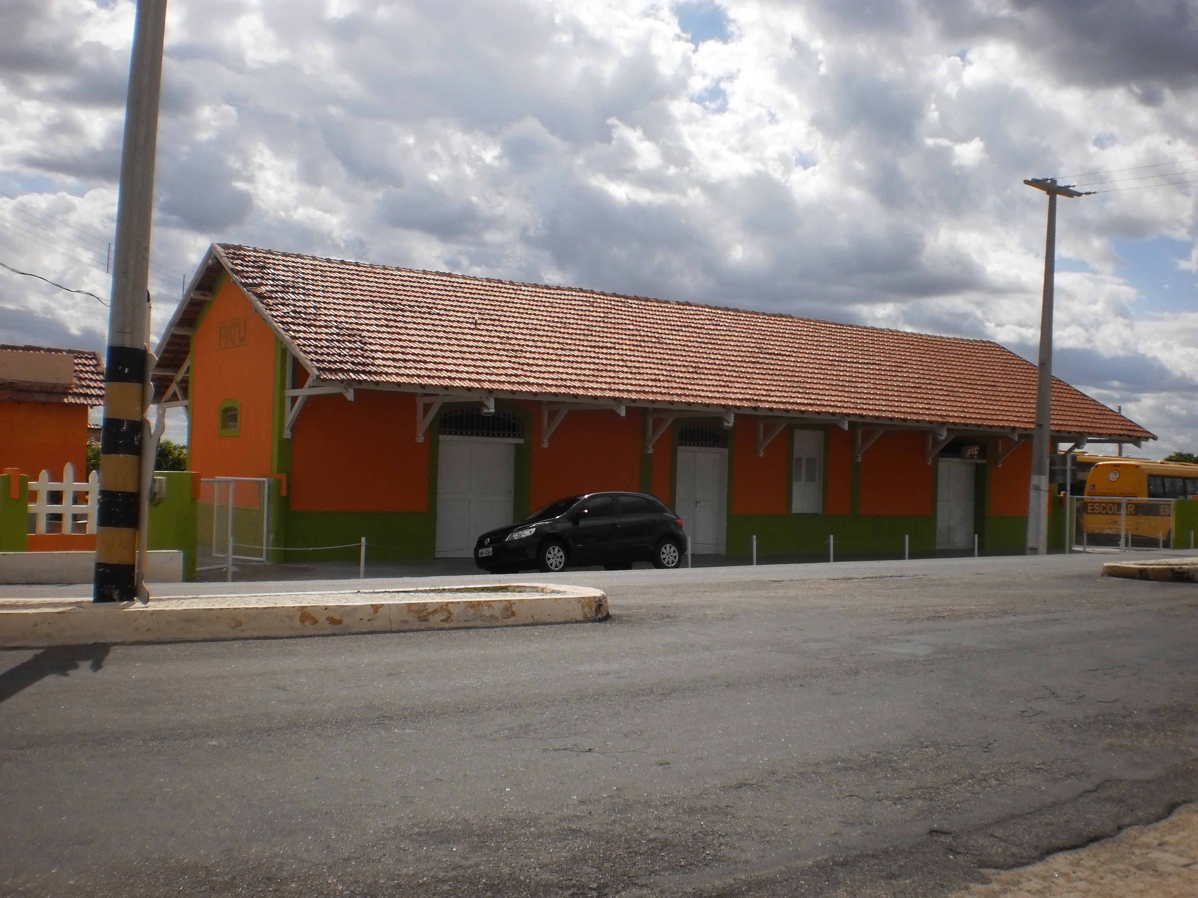 Antiga estação ferroviária de Patu - Rio Grande do Norte, Brasil.